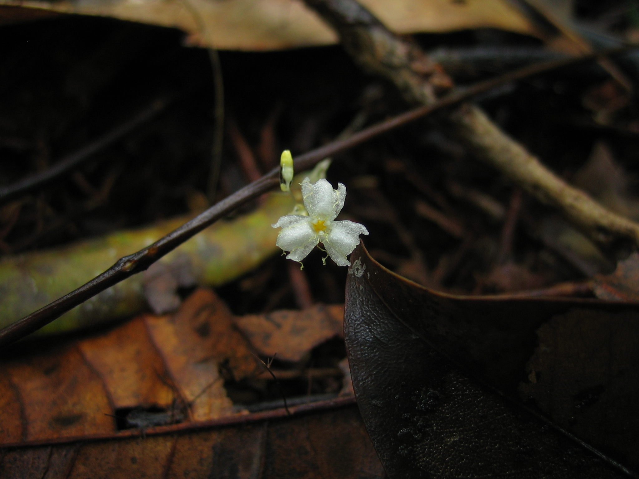 Gymnosiphon longistylus, Douala-Edea Reserve, Cameroon. Taken on 27/09/2006